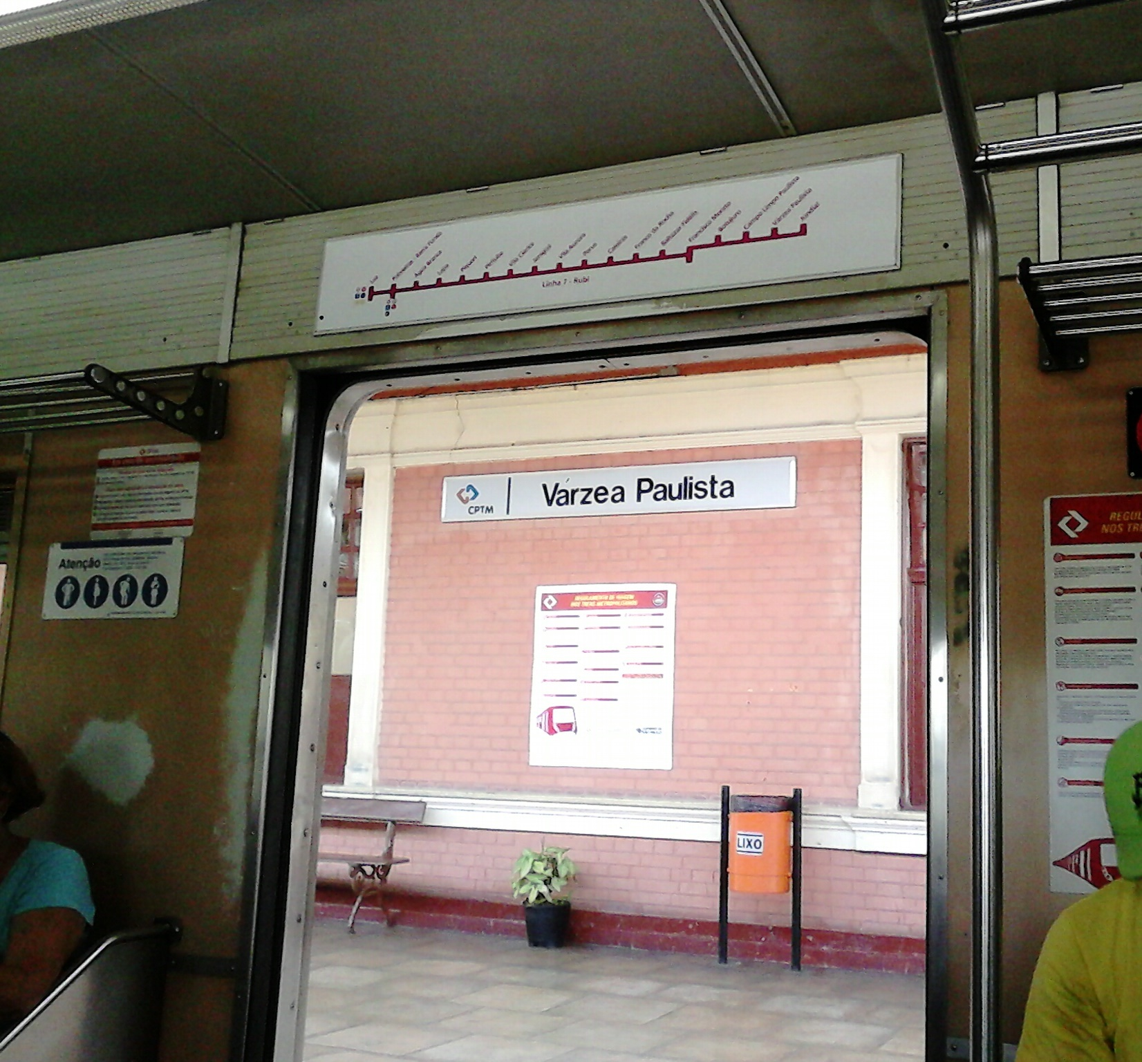 Vista vinda de um trem parado na plataforma da Estação Várzea Paulista da Linha 7 - Rubi da CPTM